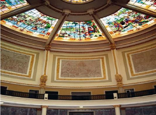 Termas de Araxá Casa de banhos, spa e tratamento de beleza. São nada menos que 16 mil m² de bom gosto primoroso e refinado acabamento. As Termas de Araxá estão ligadas ao Grande Hotel por uma galeria suspensa decorada com afrescos de paisagens dos principais pontos turísticos de Minas Gerais. Autor: Samuel Peixoto.